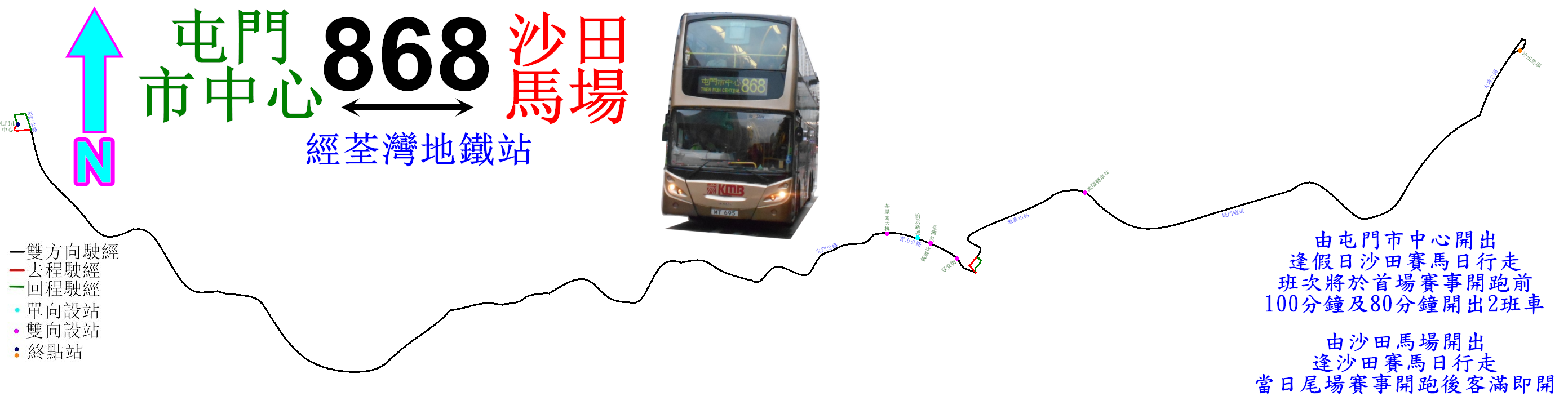 中文（香港）: 馬場巴士868線的走線圖